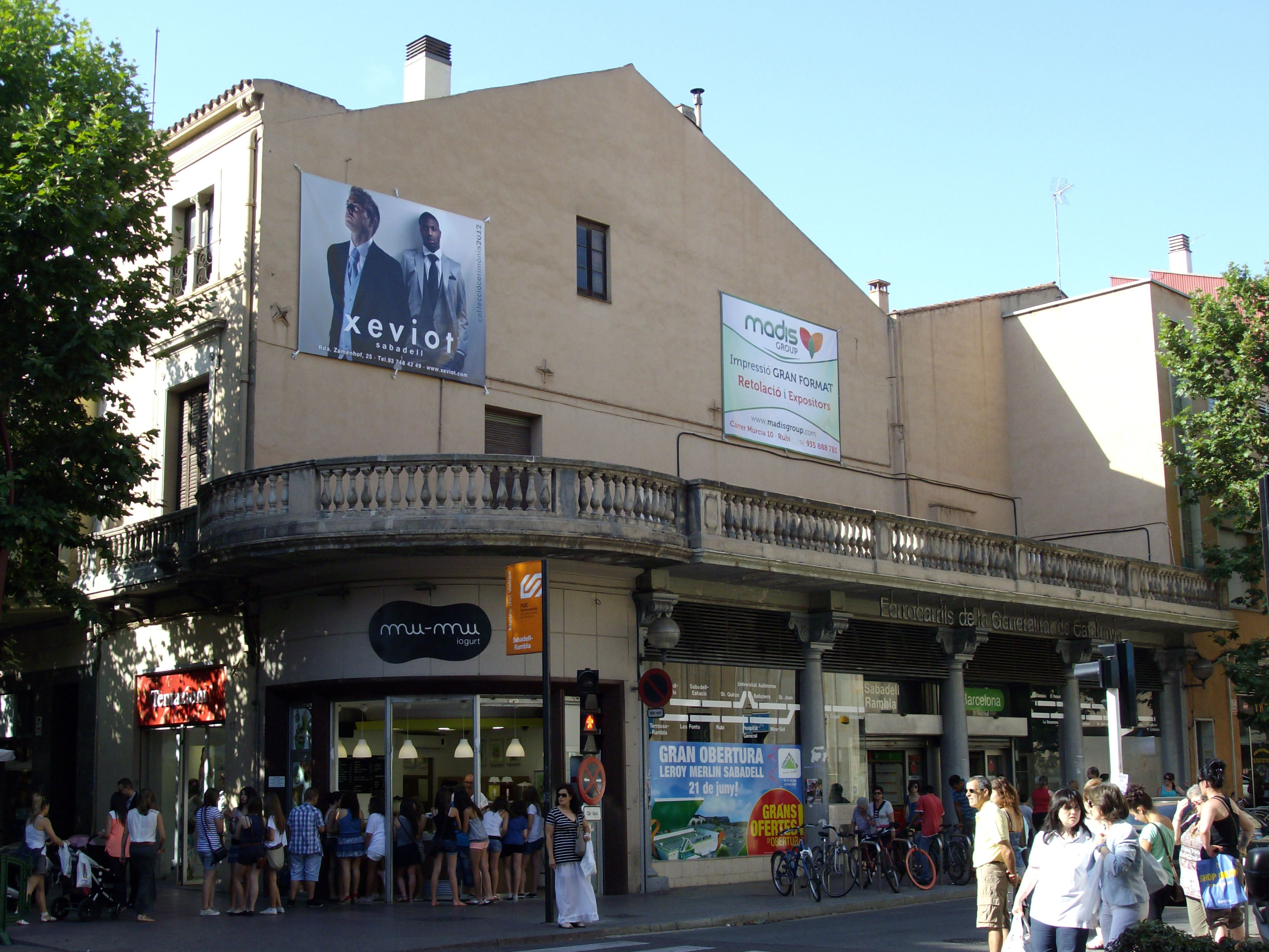 Estación de los Ferrocarriles de la Generalitat de Catalunya Sabadell-Rambla, construida en 1924, situada en la calle Alfons XIII / Rambla, de Sabadell, Barcelona (España).